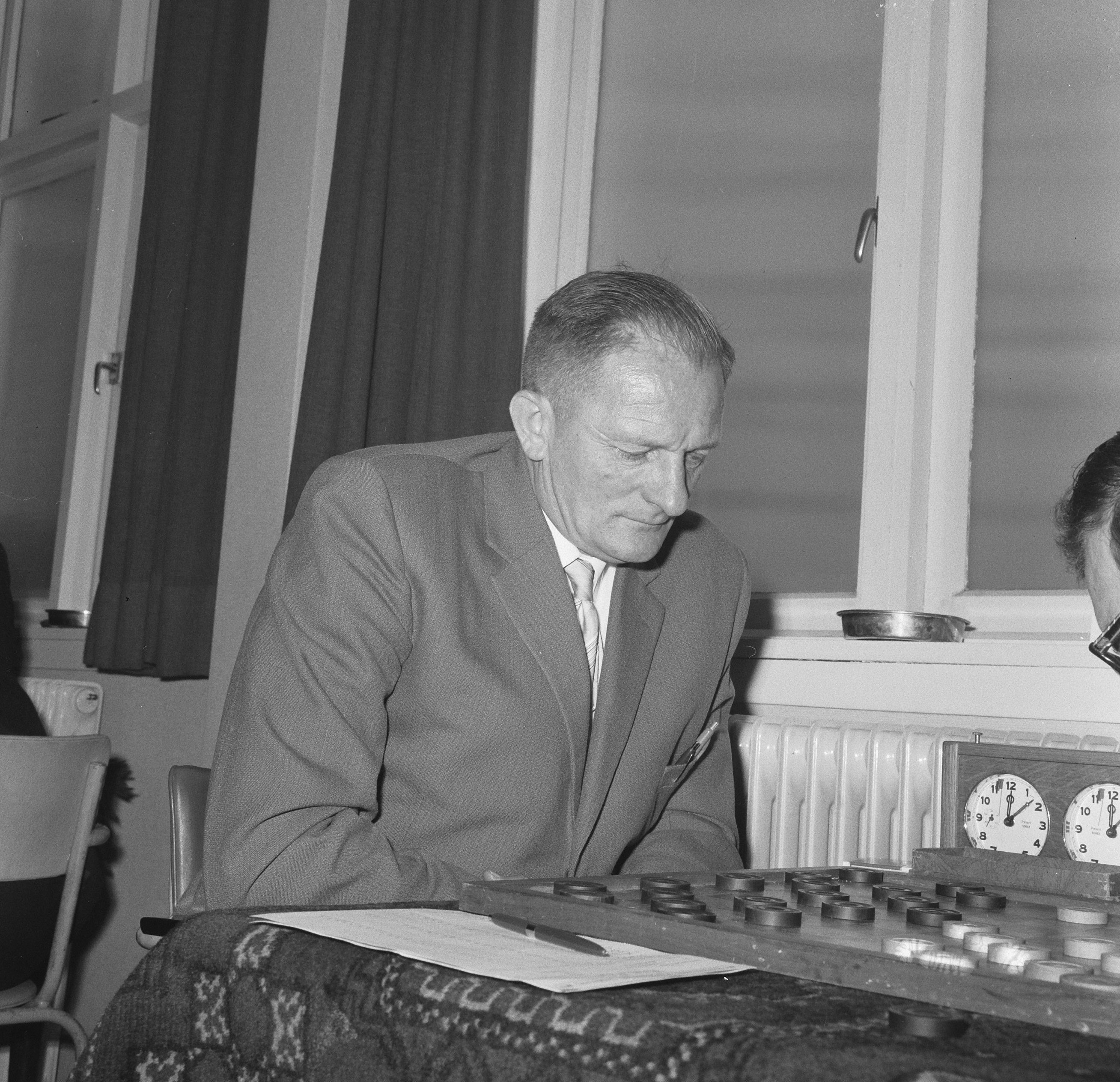 Collectie / Archief : Fotocollectie Anefo Reportage / Serie : [ onbekend ] Beschrijving : Kampioenschappen dammen in "De Kroon" , M. Bandstra achter dambord Datum : 27 maart 1965 Trefwoorden : DAMMEN, KAMPIOENSCHAPPEN Persoonsnaam : M. Boonstra Fotograaf : Nijs, Jac. de / Anefo Auteursrechthebbende : Nationaal Archief Materiaalsoort : Negatief (zwart/wit) Nummer archiefinventaris : bekijk toegang 2.24.01.03 Bestanddeelnummer : 917-5813